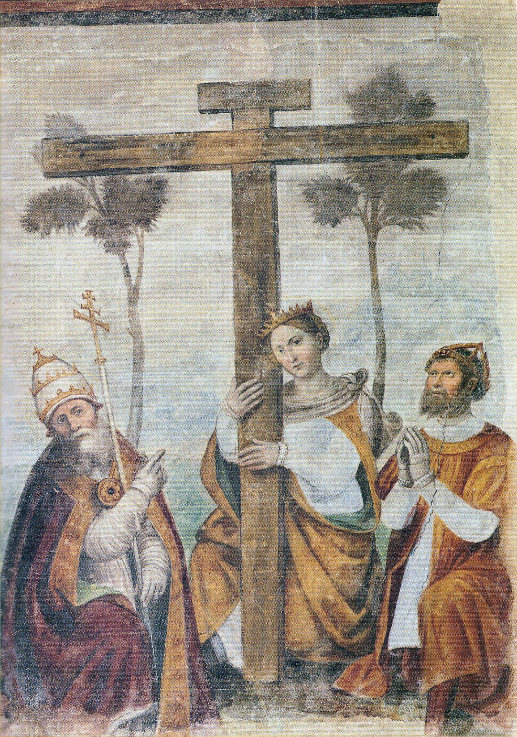 Adorazione della Croce con i santi Costantino, Elena e Silvestro (paolo da caylina il giovane, chiesa di santa croce, Brescia)